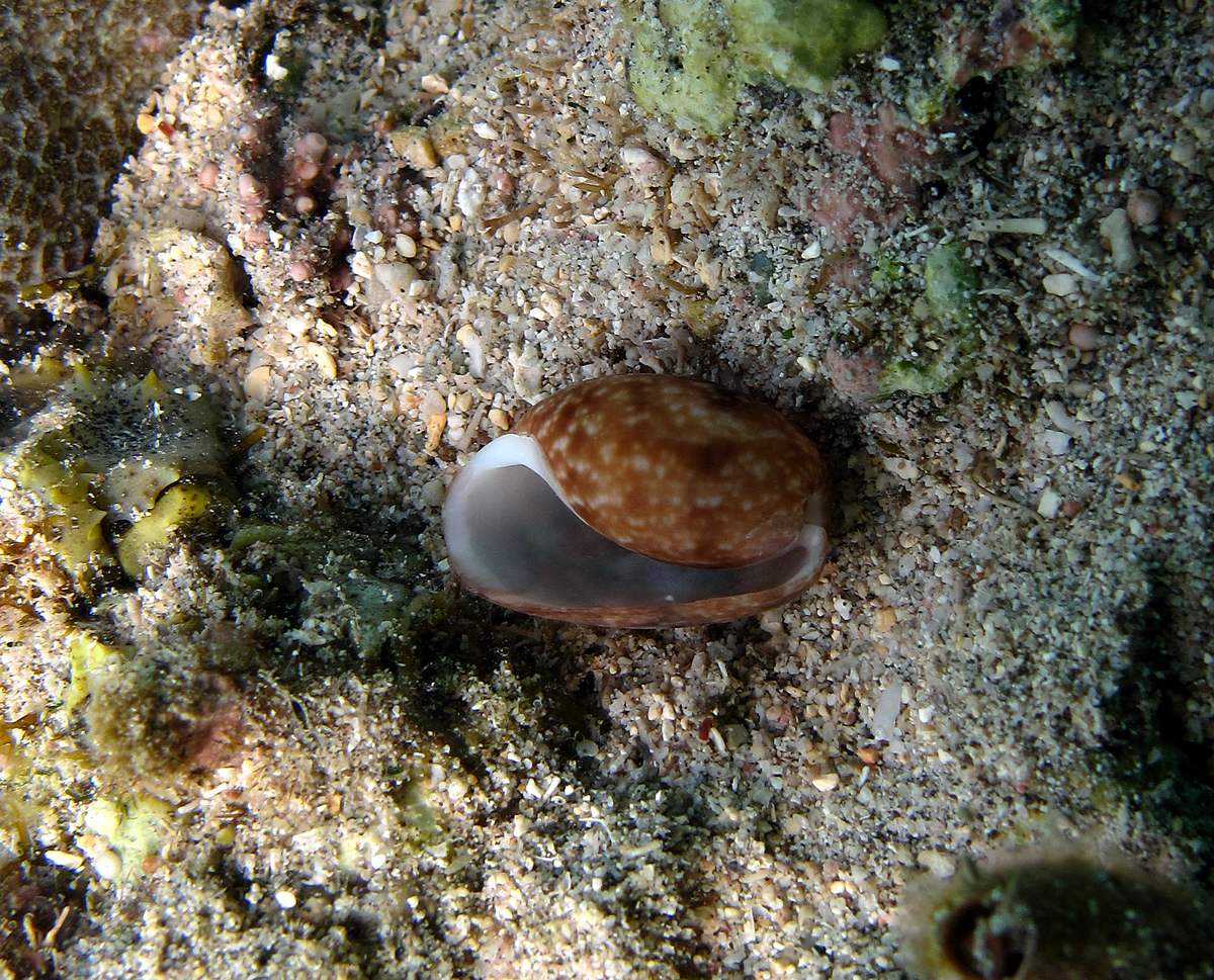 Une coquille de Coquille de Bulla vernicosa (Opistobranches) à la Réunion.